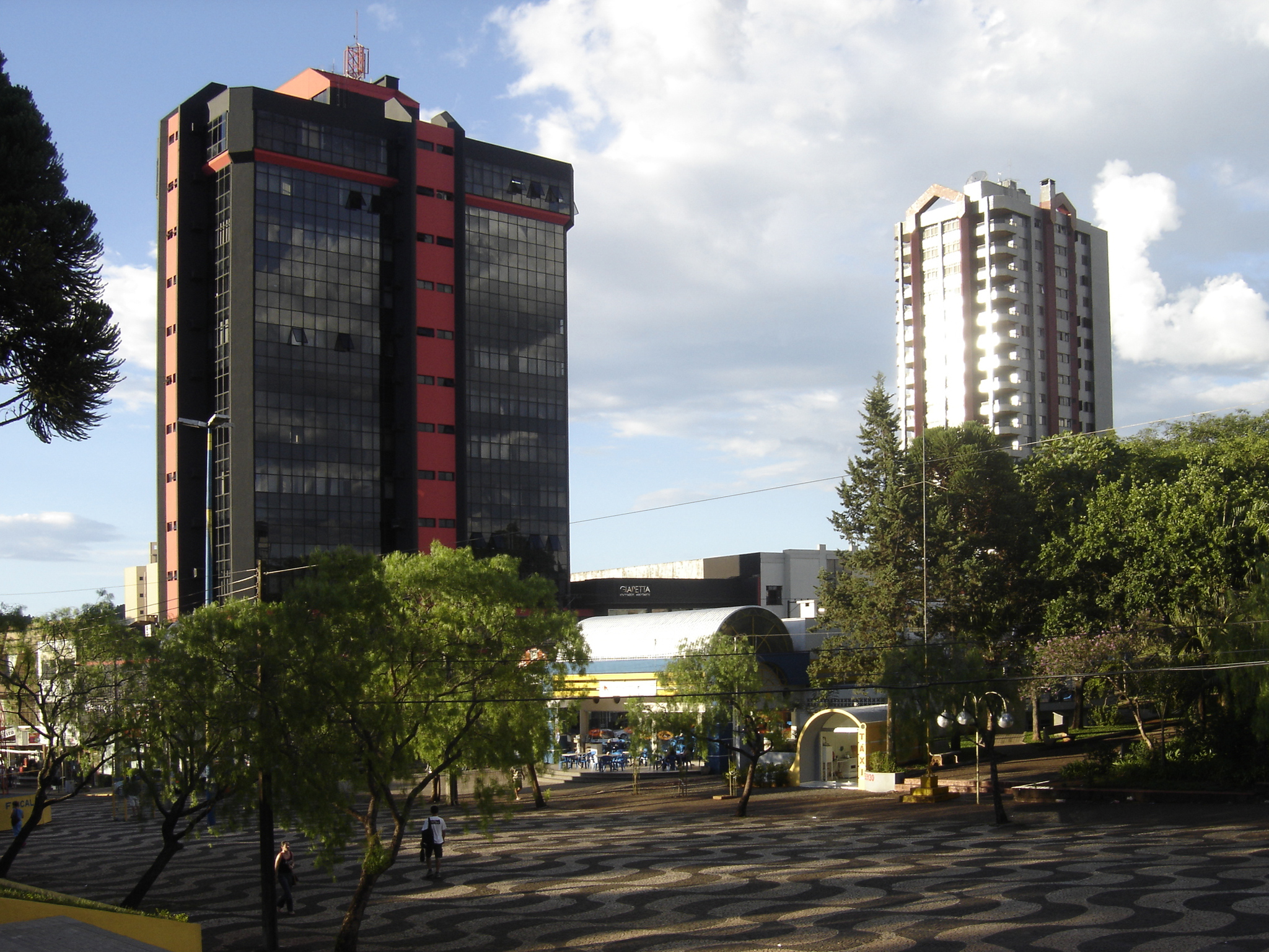 Praça Eduardo Virmond Suplicy, com Edificios Realcenter e Eldorado atrás.